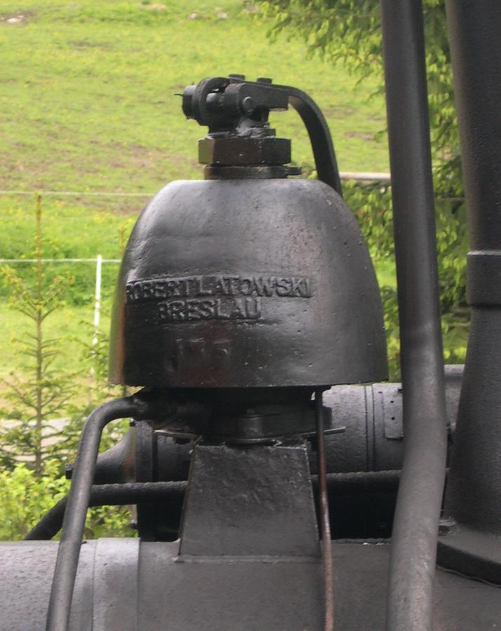 Latowski-Dampflaeutewerk auf der Schmalspur-Dampflok 99 4511 der Pressnitztalbahn